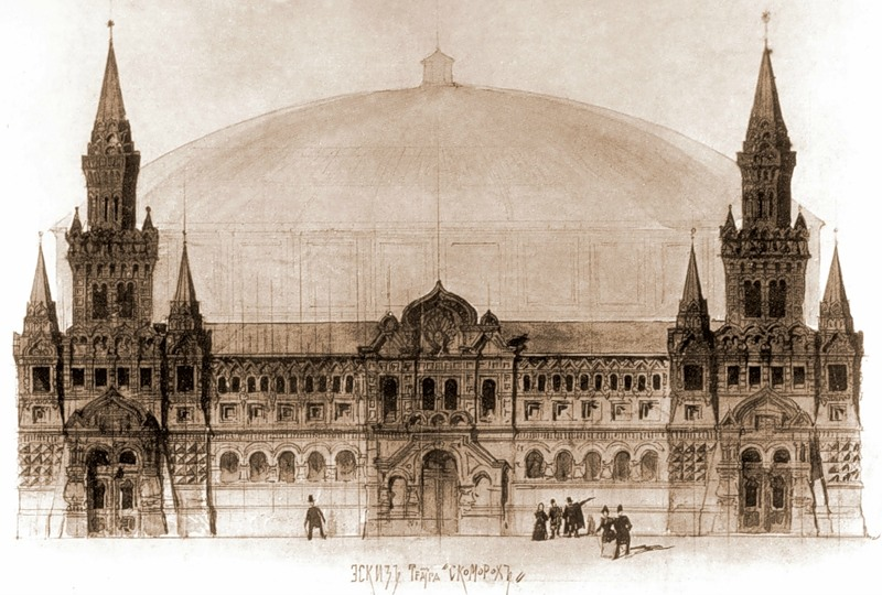 Ф. О. Шехтель. Театр "Скоморох". Проект фасада (1886)